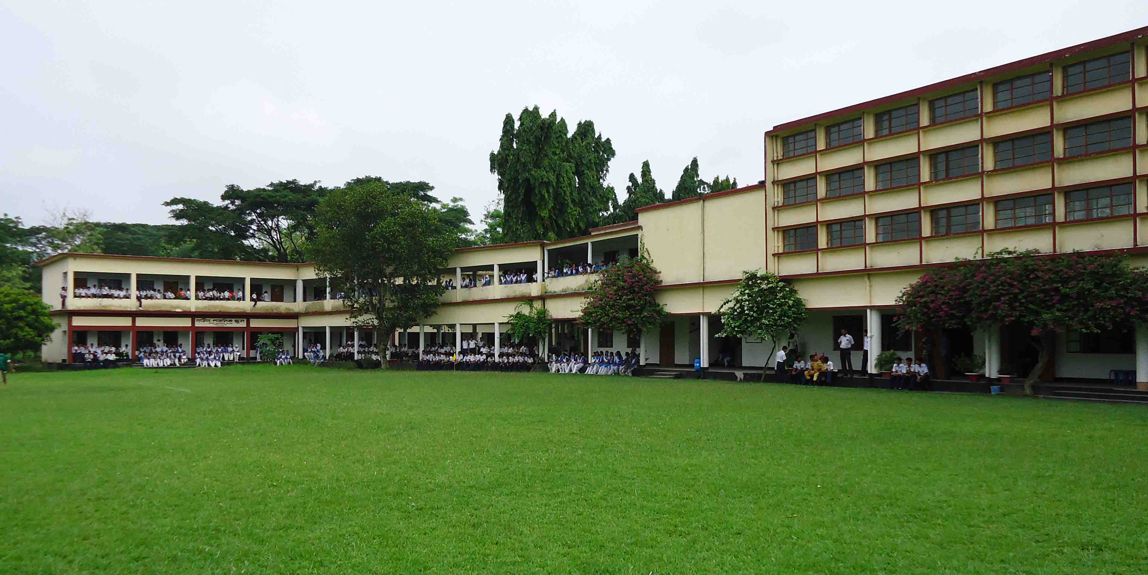 দাউদ পাবলিক স্কুল এন্ড কলেজ ক্যাম্পাস